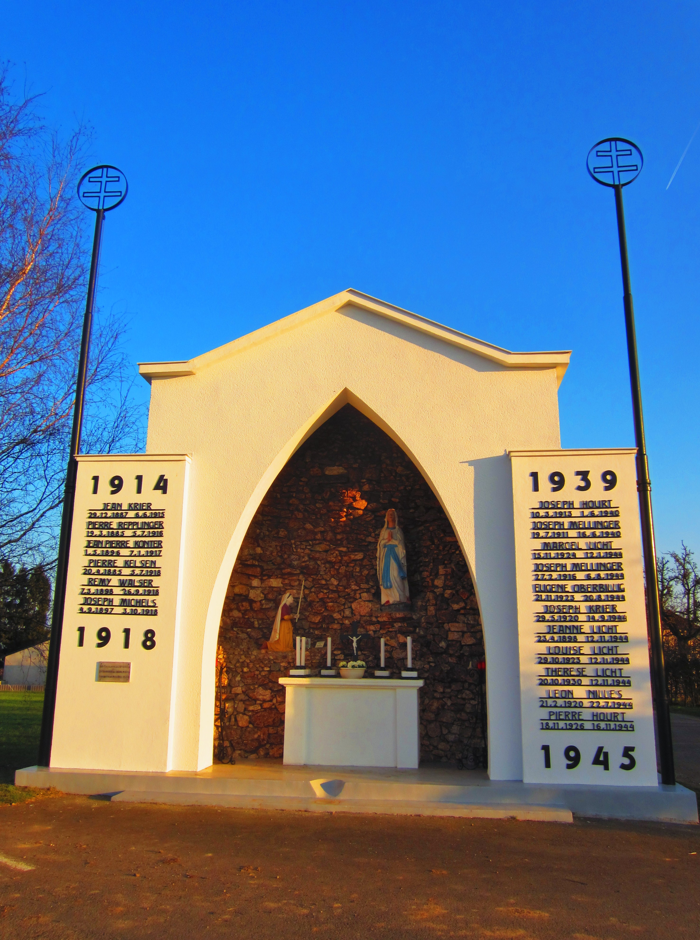 Calvaire Kirsch Sierck